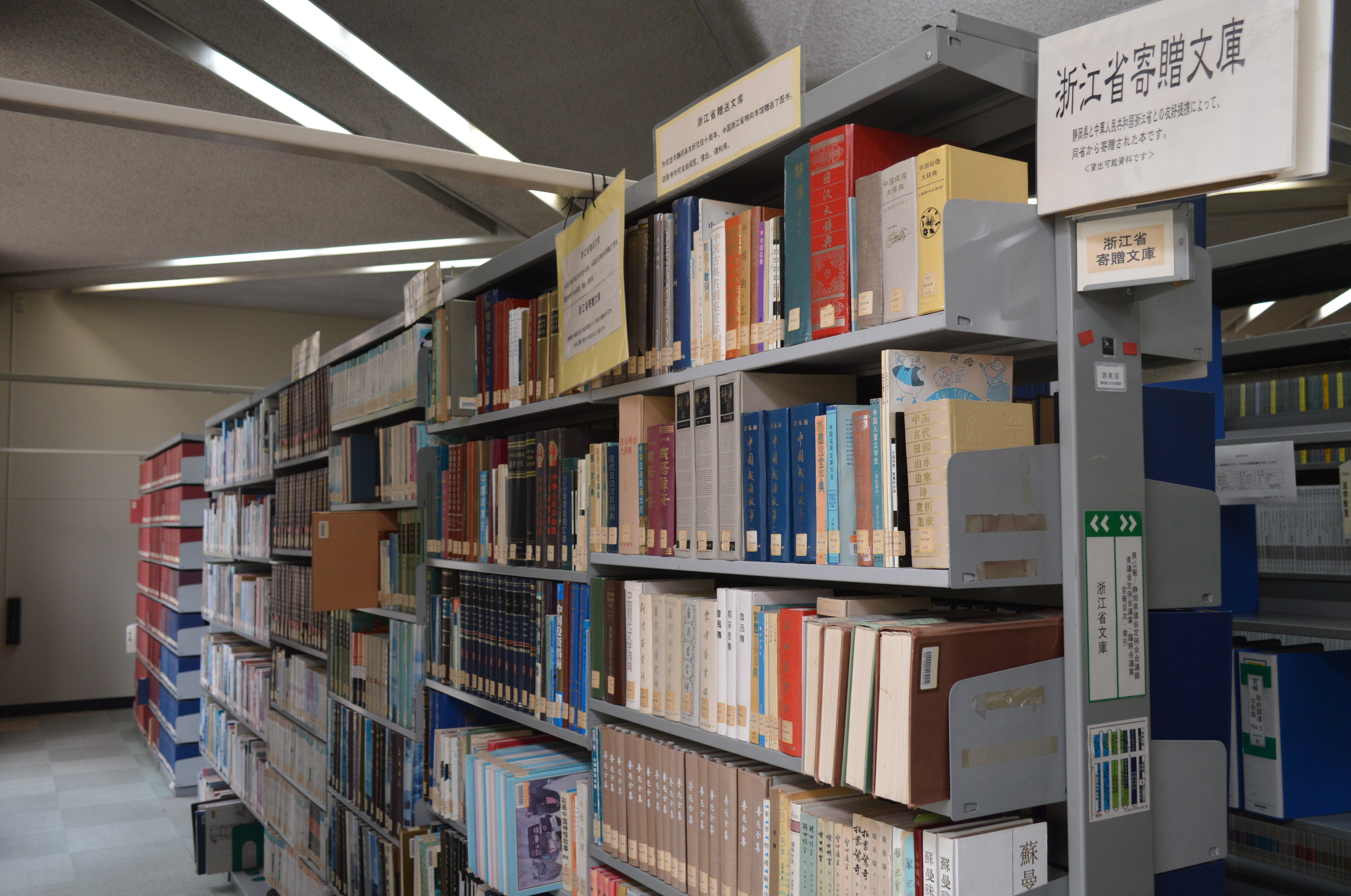 静岡県立図書館。中国の浙江省から寄贈された文庫。